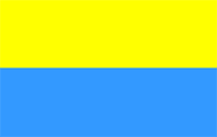 Summary Drapeau de la principauté de Daspalla Source Nataraja Statut Nataraja